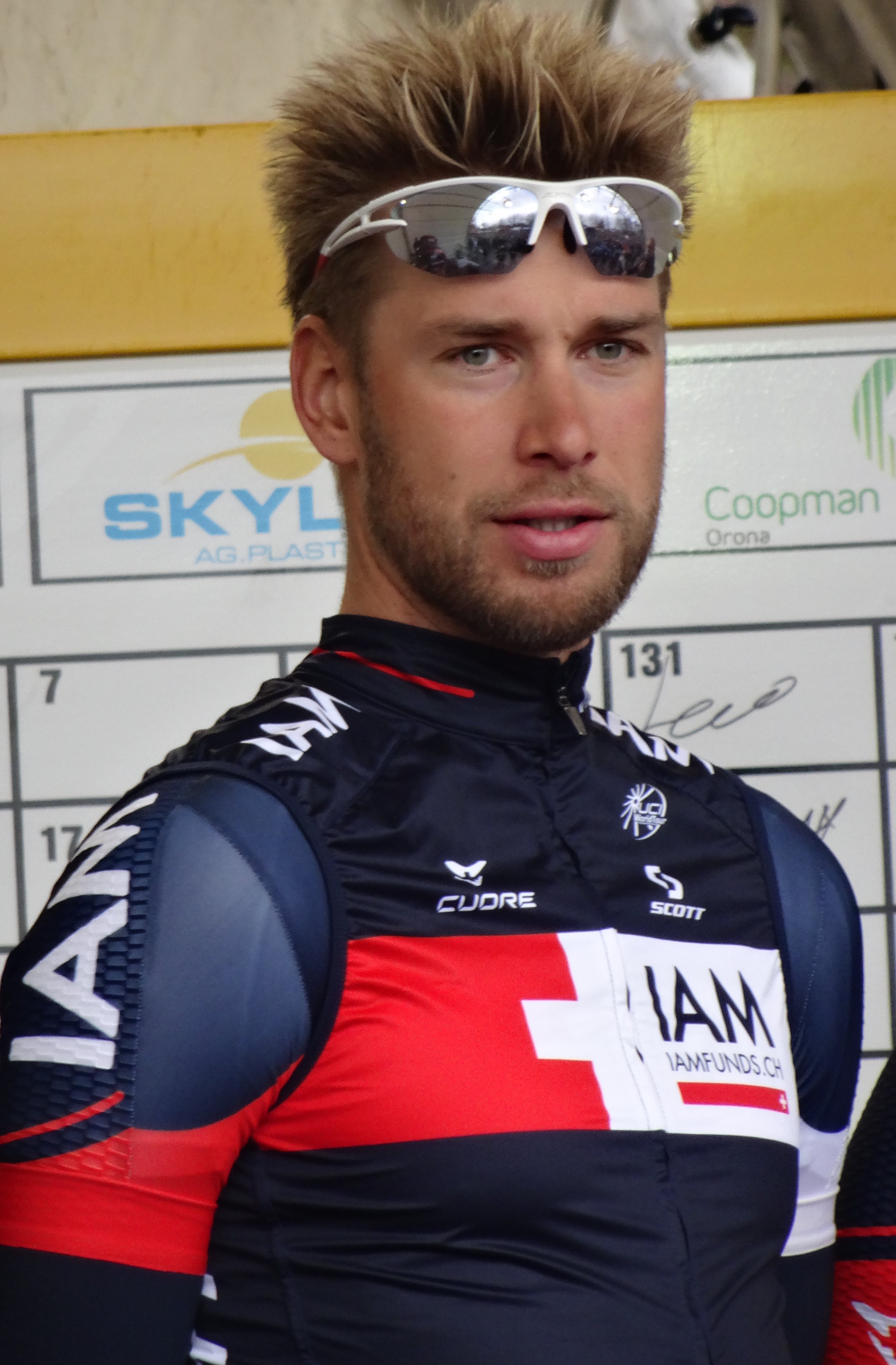 Reportage réalisé le dimanche 1er mars à l'occasion du départ et de l'arrivée de Kuurne-Bruxelles-Kuurne 2015 à Kuurne, Belgique.